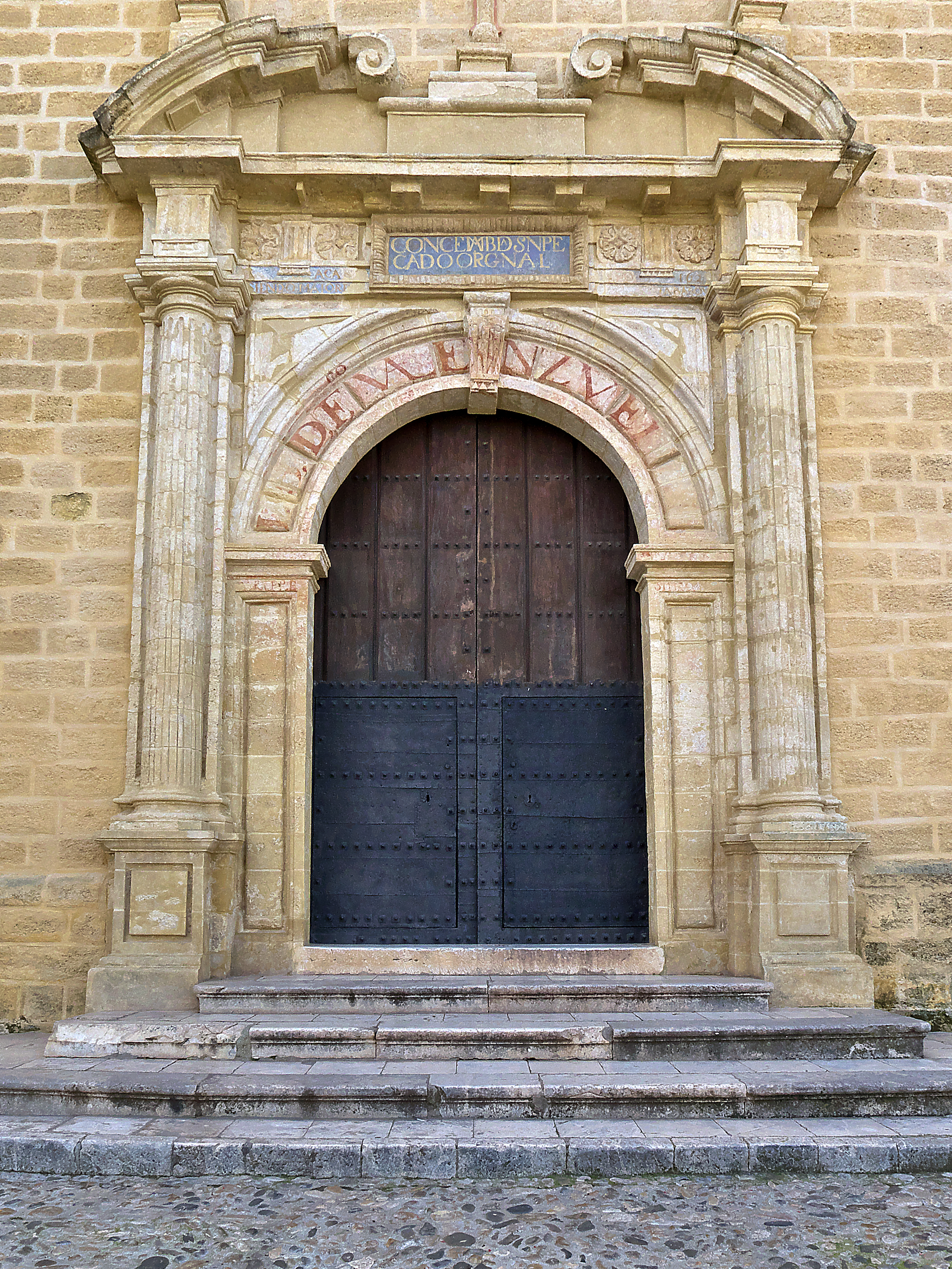 Muro del Evangelio.